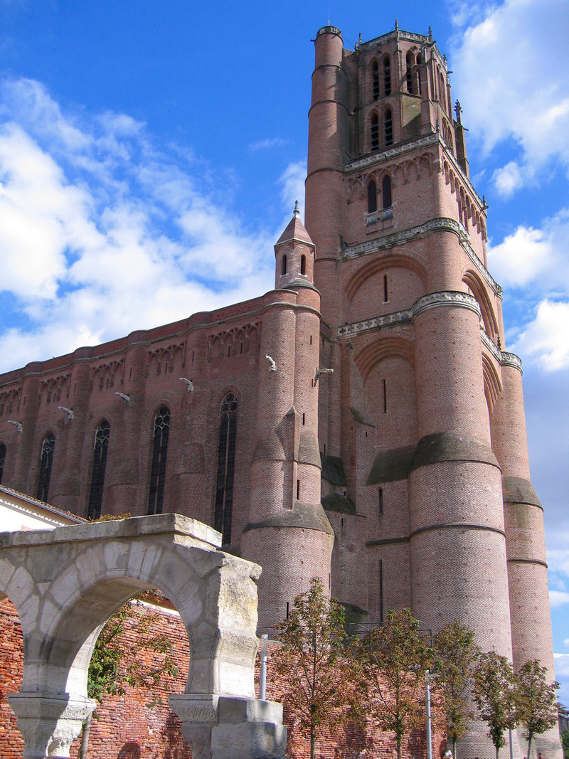 Cathédrale Ste-Cécile (Albi) .